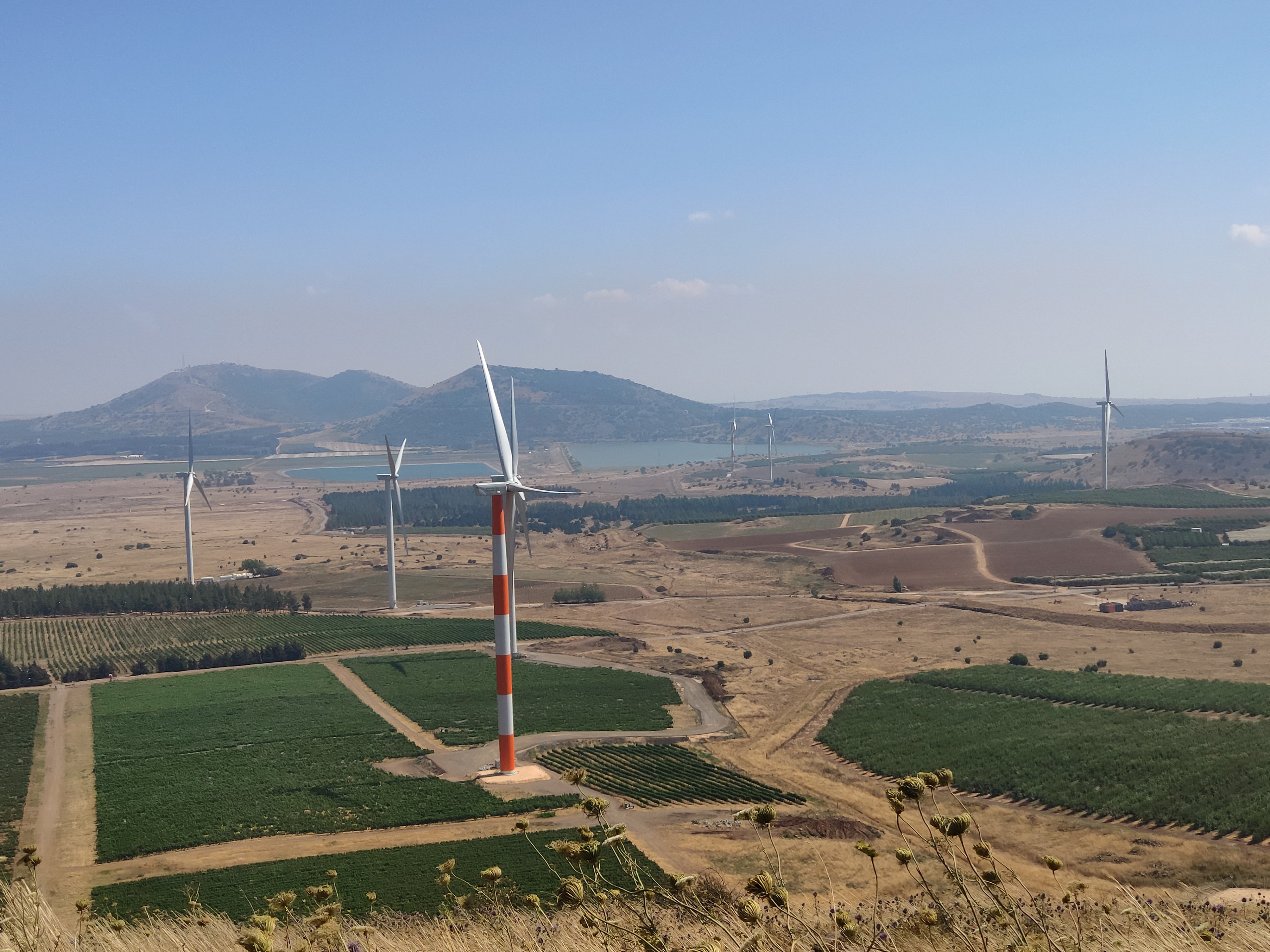 חוות הרוח עמק הבכא בצילום מהחרמונית, יולי 2020. ברקע הר בנטל ואביטל, ומאגרי המים בנטל ובראון